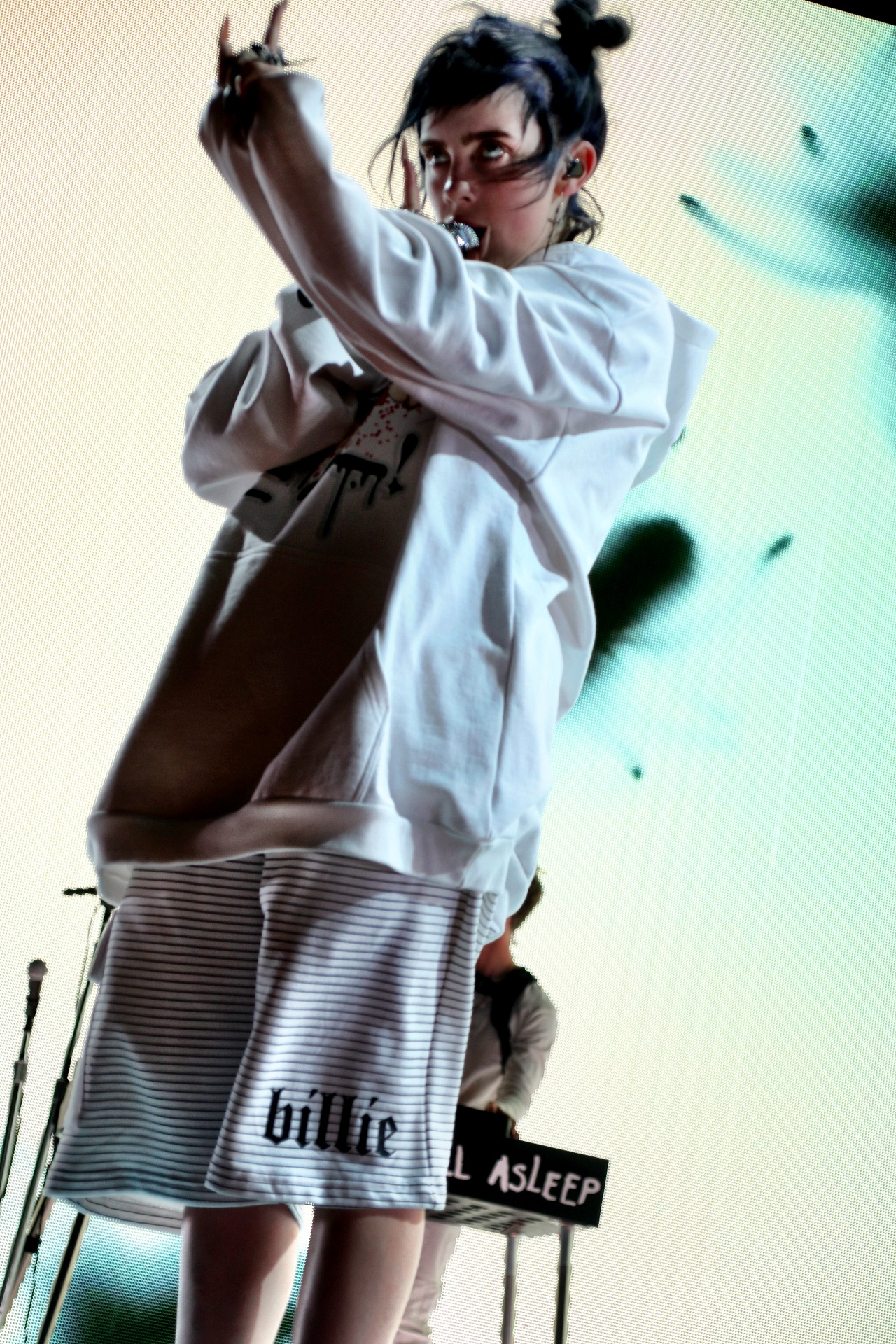 Billie Eilish ::: Red Rocks::: 06.05.19